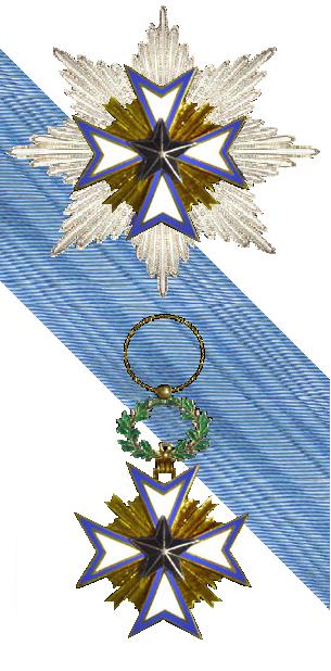 Eigen tekening Robert Prummel